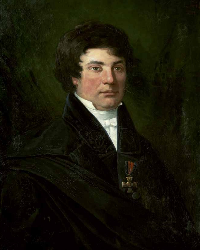 Johan Gustaf Sandbergs porträtt av Israel Hwasser överlämnades som gåva till universitetet av Carl XV i samband med hans Uppsalabesök i november 1861. Fotografi Lars Wallin av Ludvig Frids kopia av målningen.